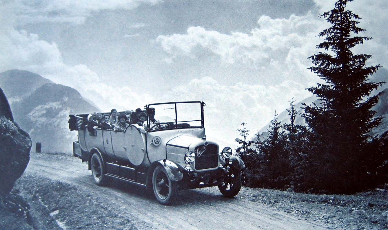 Car-Alpine Postauto, Saurer AD, Benzinmotor, 60 PS, 17 Plätze, um 1930